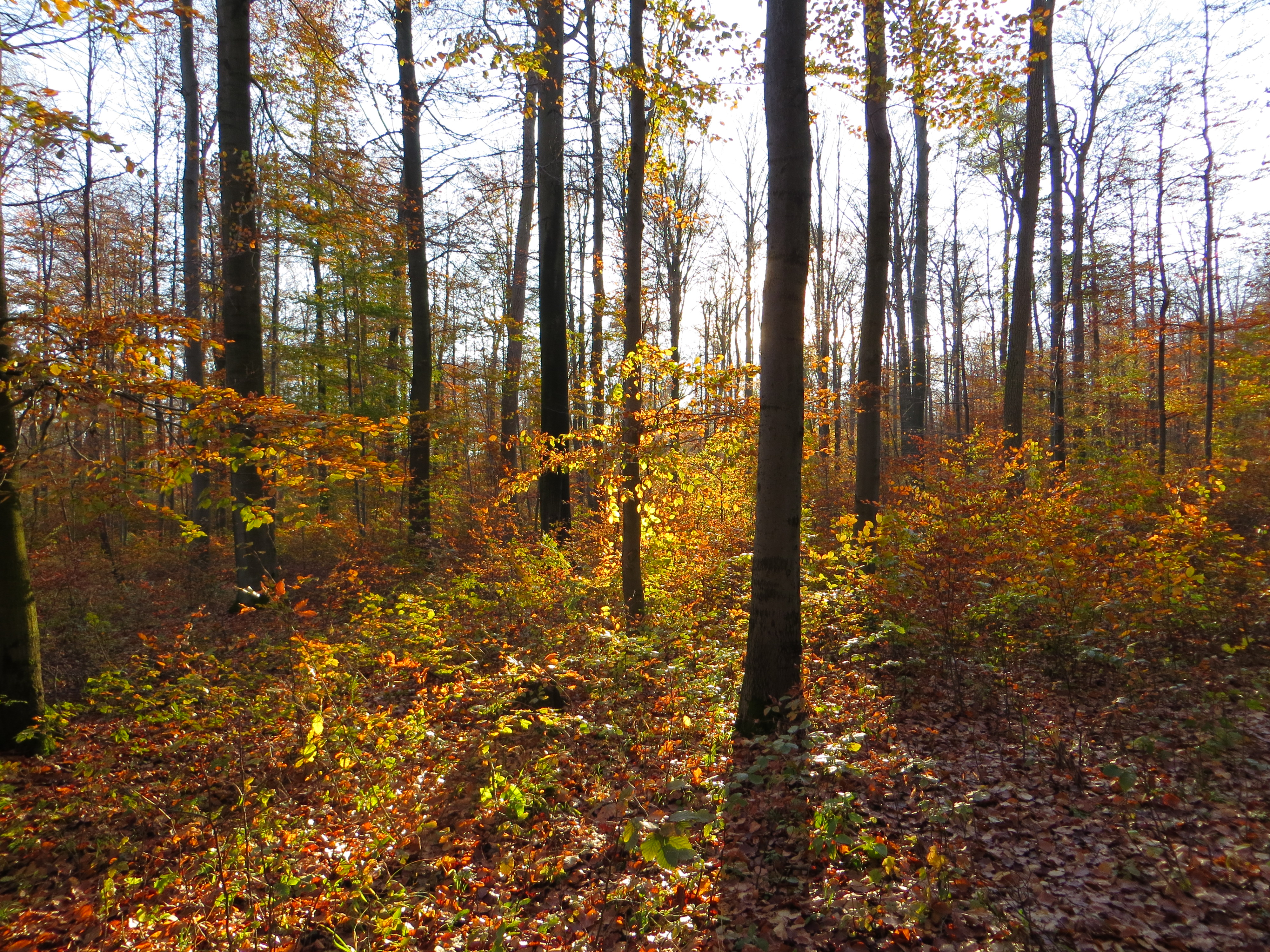 Herbst im NSG Keulaer Wald